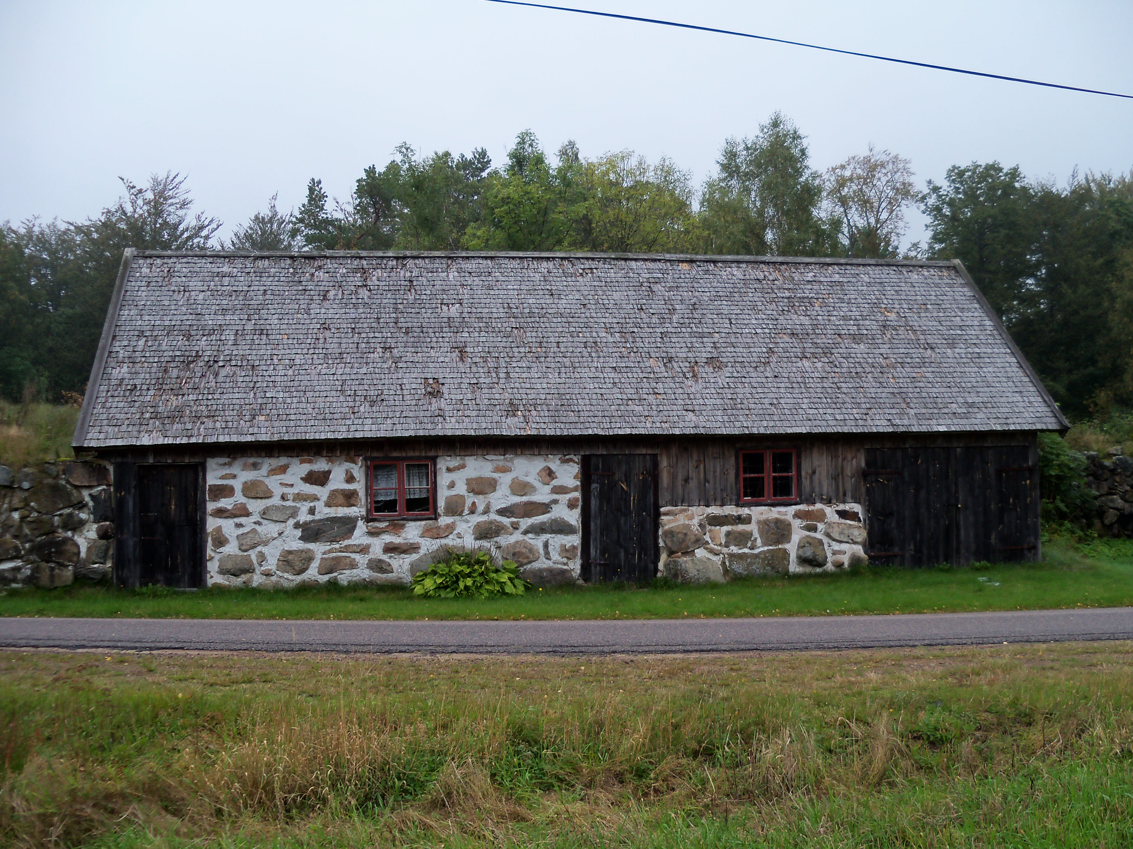 Backstugan i Fladalt